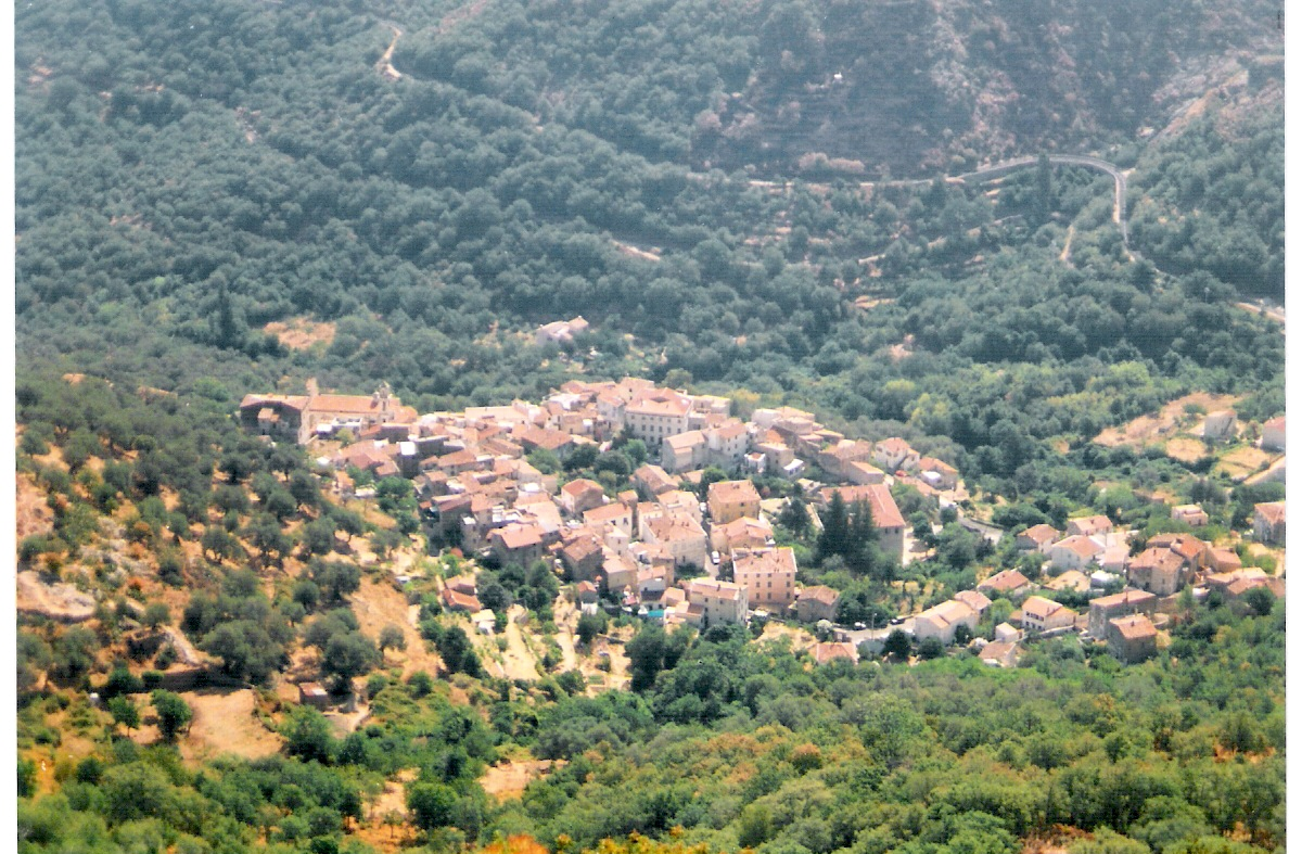 Le village de Muro,Balagne, Haute-Corse. Photographie prise du pic Avazeri. Réalisation personnelle. Auteur:utilisateur (balaninu). 1998.